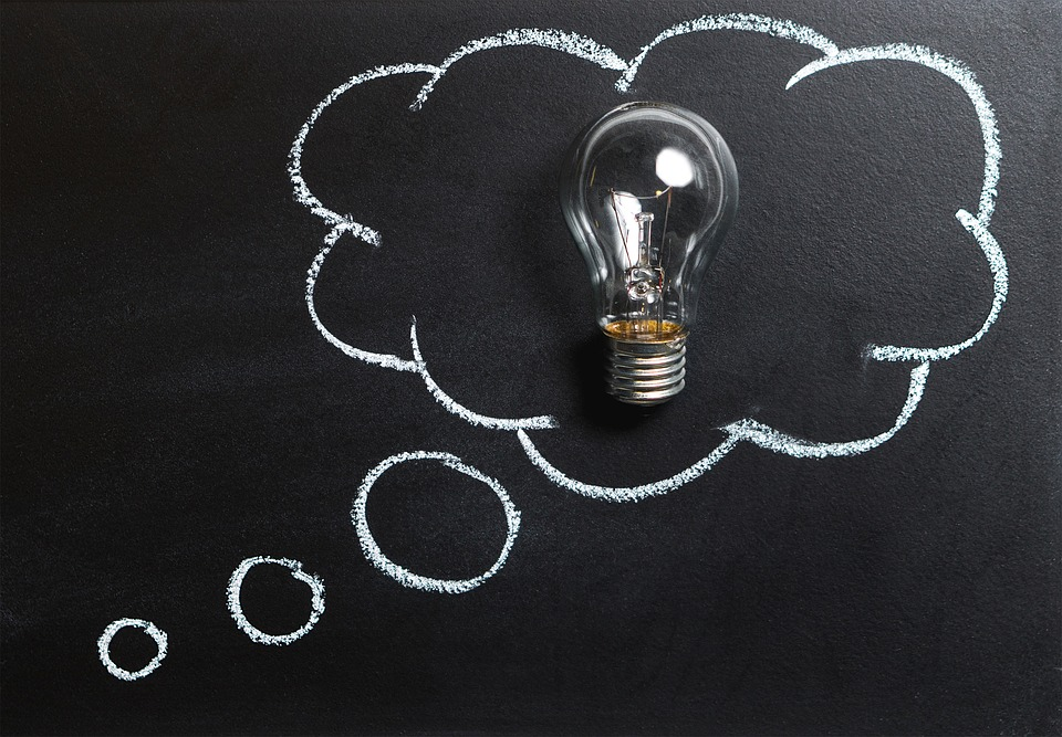 Lampadina idea